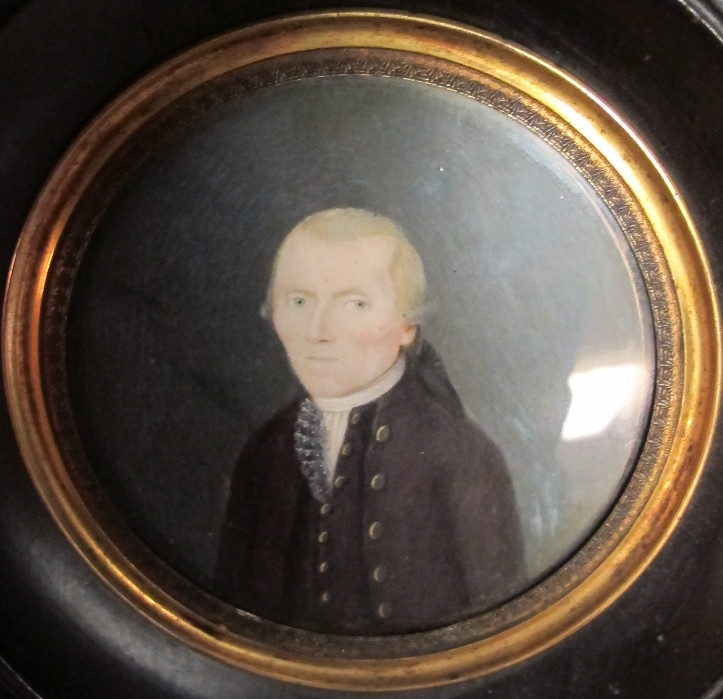 Portrait conservé au musée Charles-de-Bruyères de Remiremont